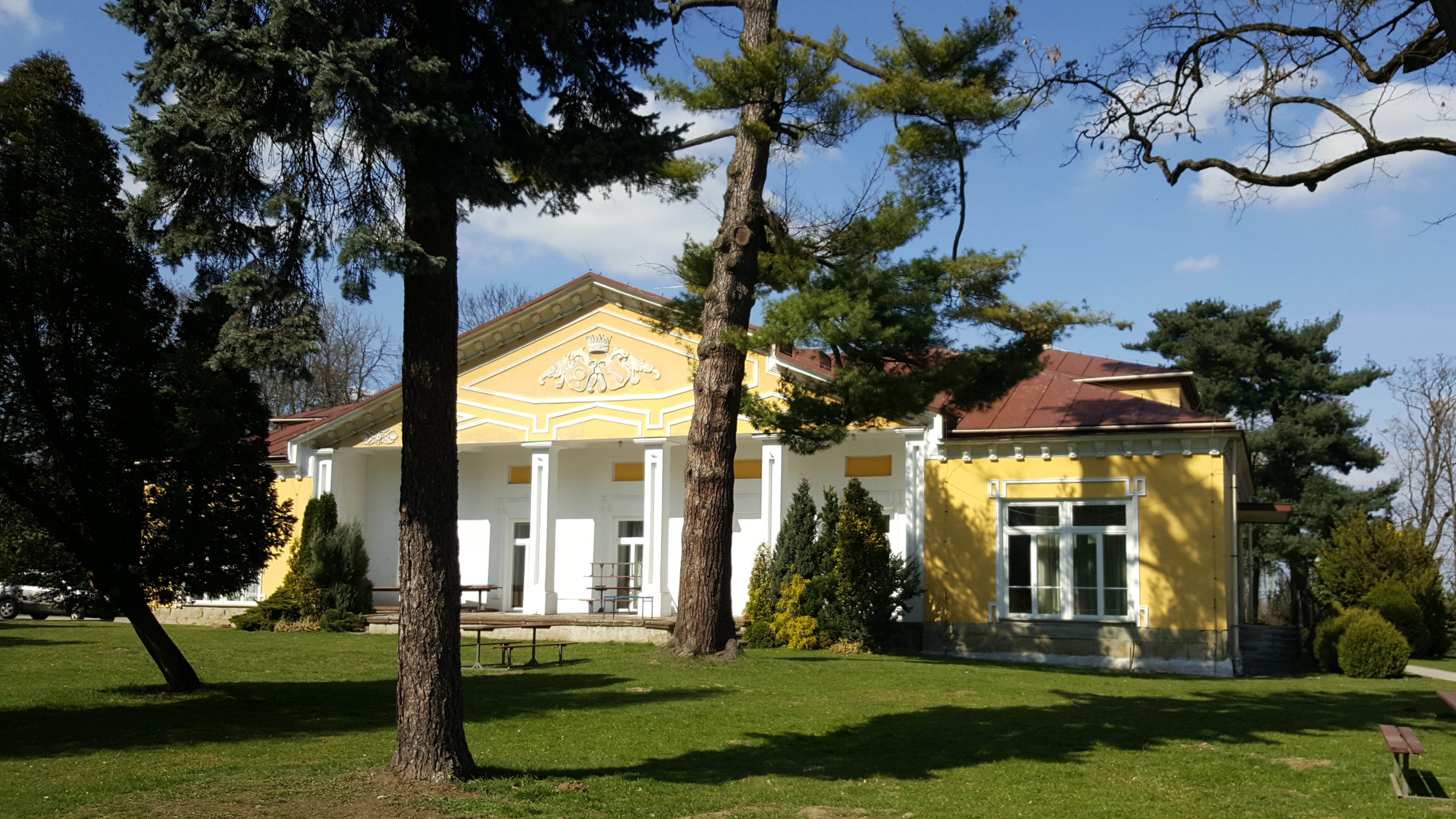 Zbylitowska Góra, Budynek dworu (zespół dworski z XIX wieku w Zbylitowskiej Górze)